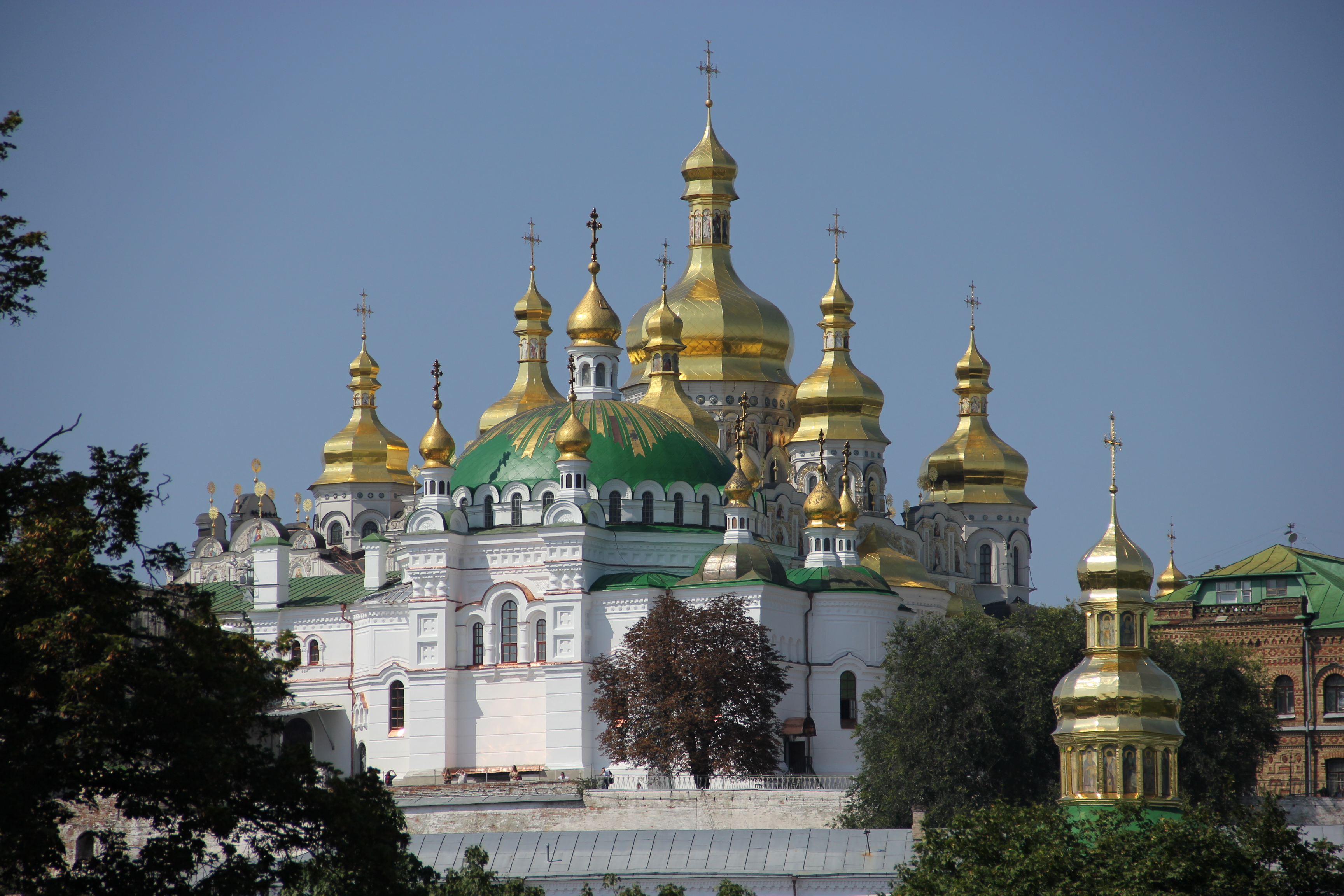 Успенський собор Києво-Печерської лаври